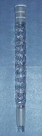 A glass-made Vigreux column.